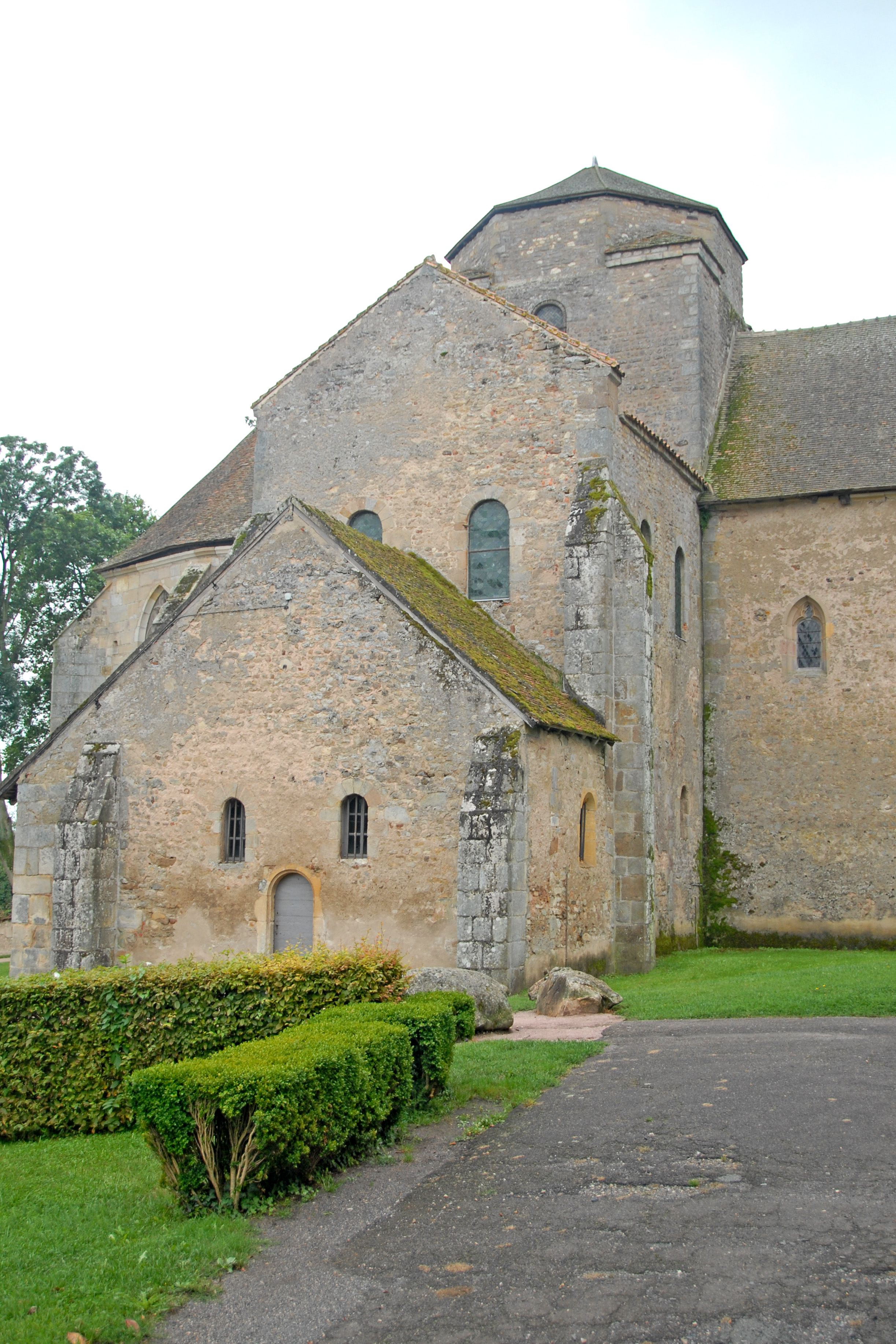 Abteikirche, Querhaus von W